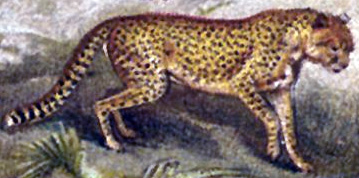 Asiatischer Gepard